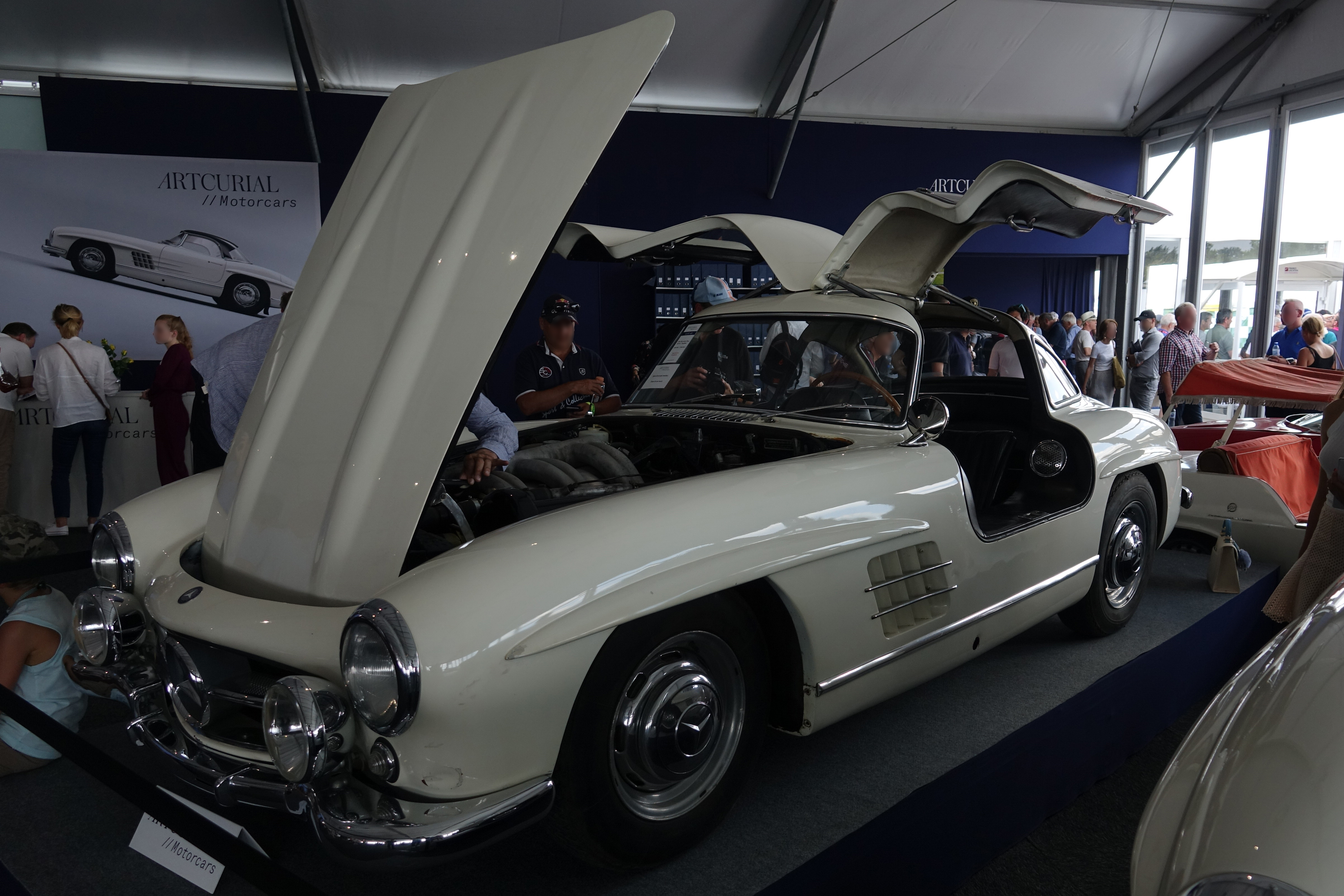 1956 Mercedes-Benz 300 SL Gullwing ("Papillon") Châssis n° 198.040 6500180. Swedish owner 1966 to 2018. No reserve, sold for 1,013,200 € at Vente Artcurial - Le Mans Classic 2018.[1]